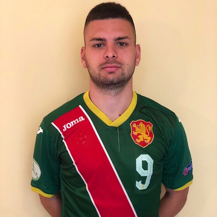 Гинчев с екипа на България до 19г.